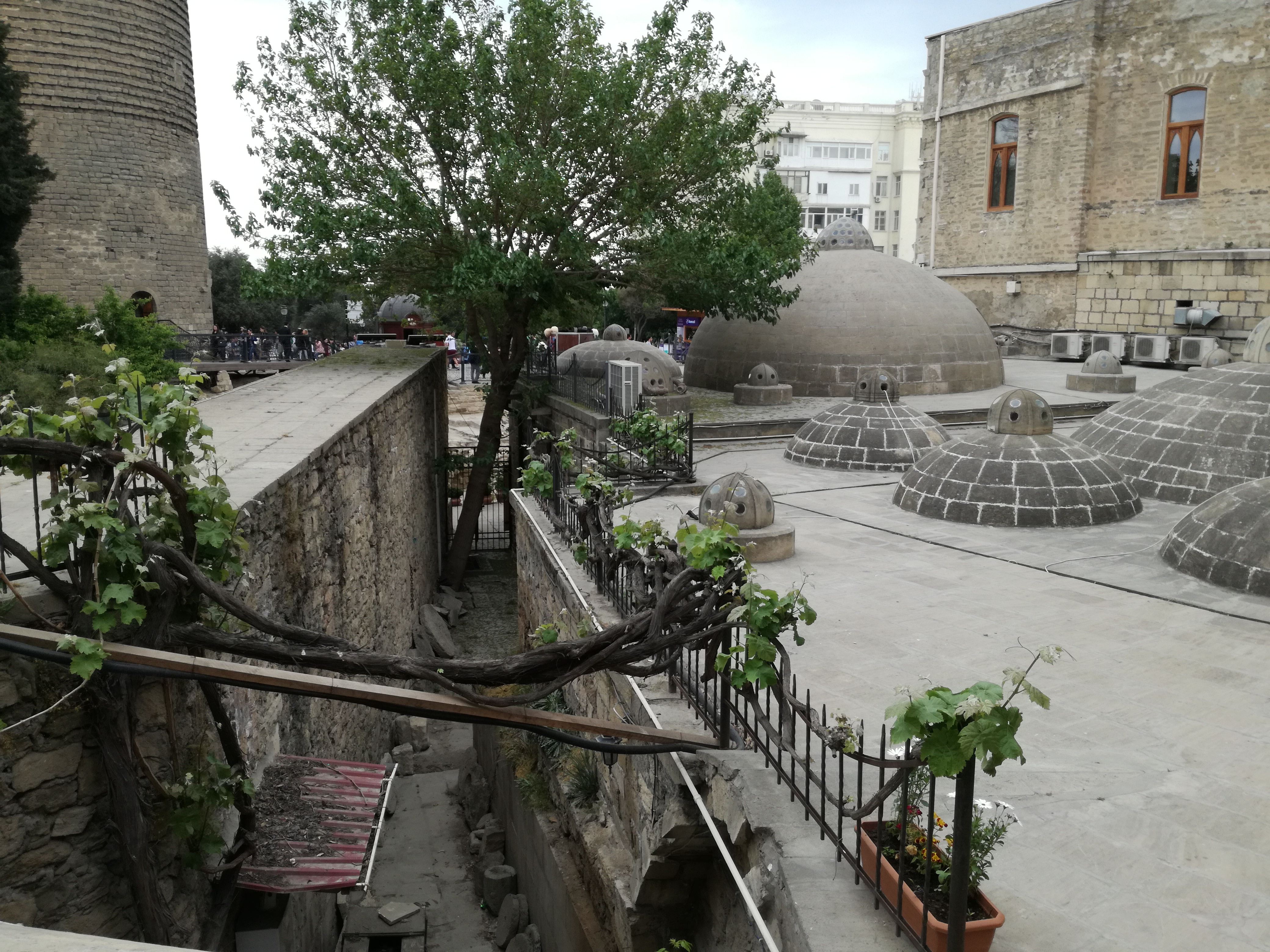 Ичери-шехер. Баня Гаджи Гаиба